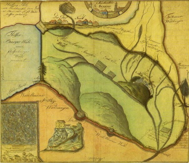 Lageplan von Schloss Ahornburg, Arnsburger Wald und Burg Schellenberg (Oberpfalz)